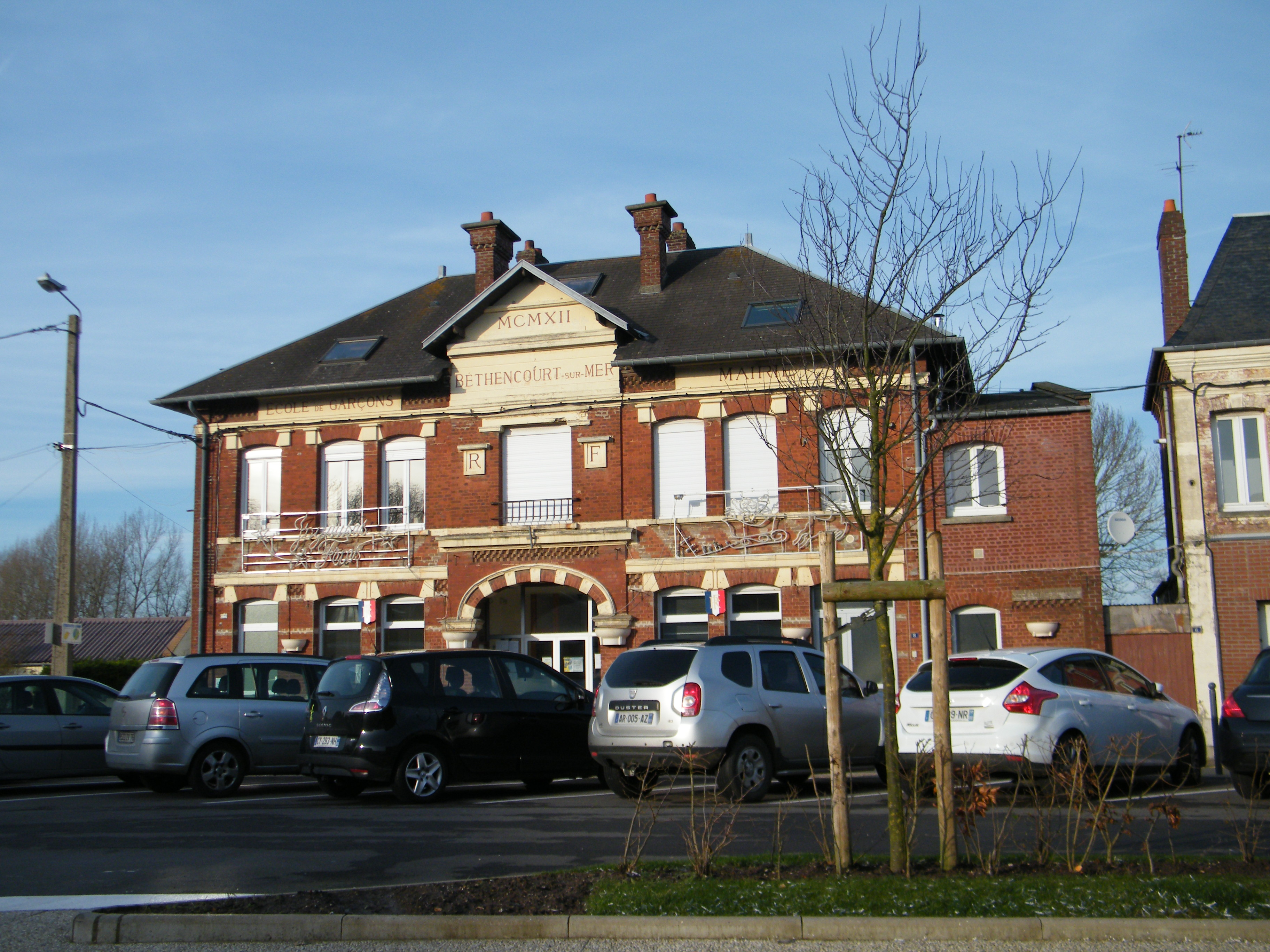 Près de l'église, mairie-école de 1912.